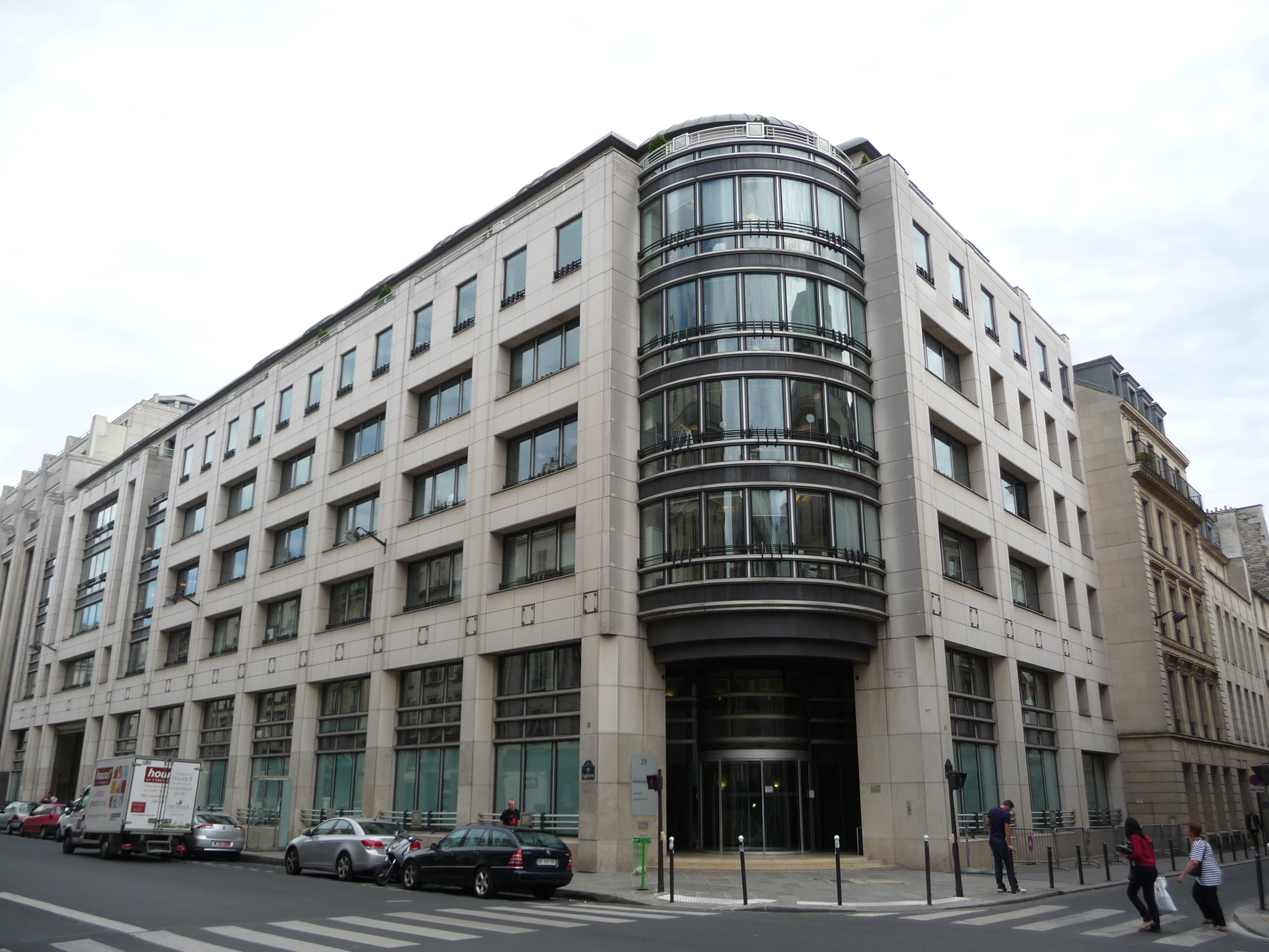 Vue du siège social du groupe Express-Roularta.